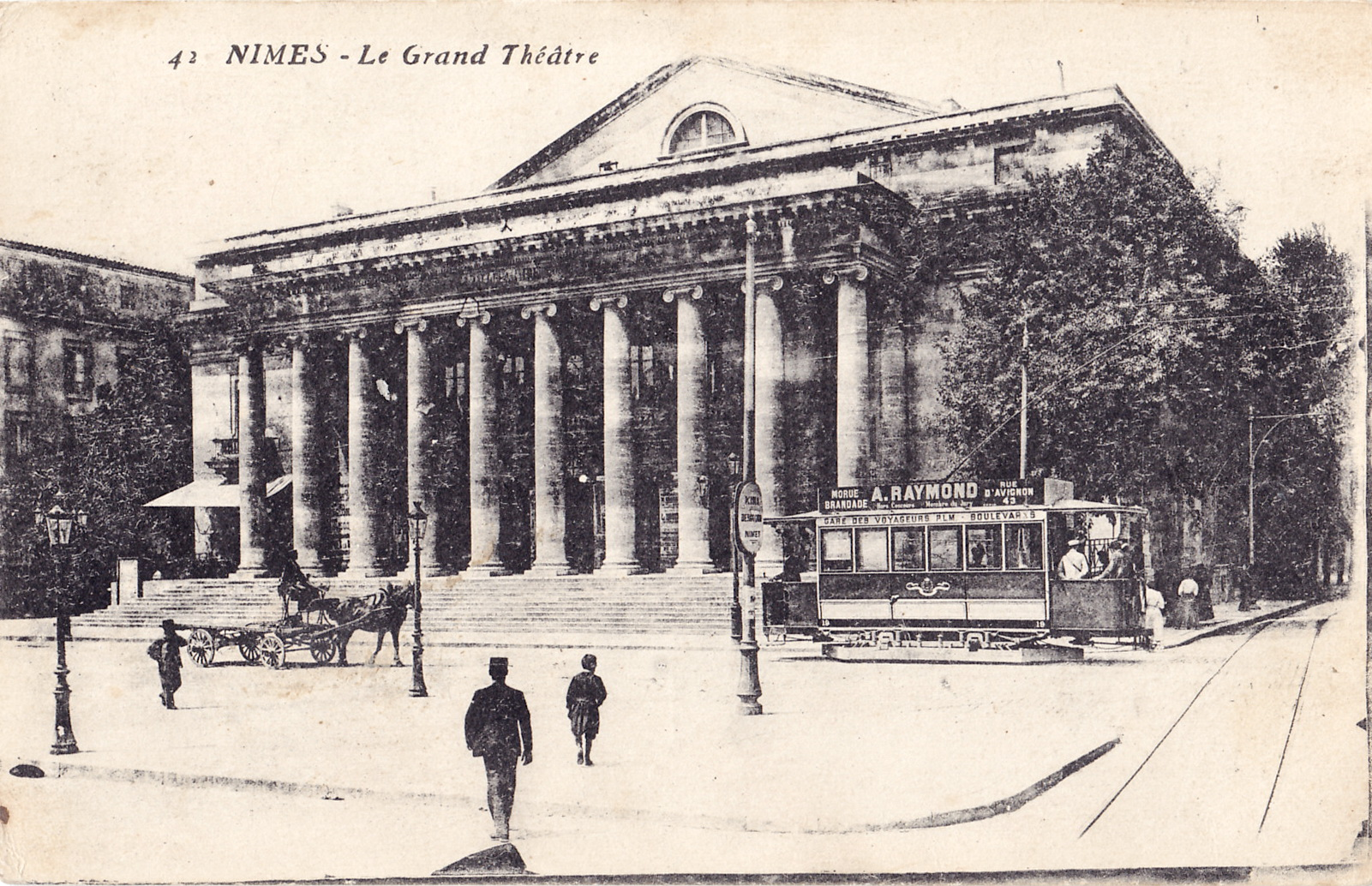 Carte postale sans mention d'éditeur, n°42 :NÎMES - Le Grand Théâtre